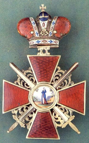 Jewel of the Order of Saint Anna (Imperial Russia) Знак ордена св. Анны 2-й степени с императорской короной